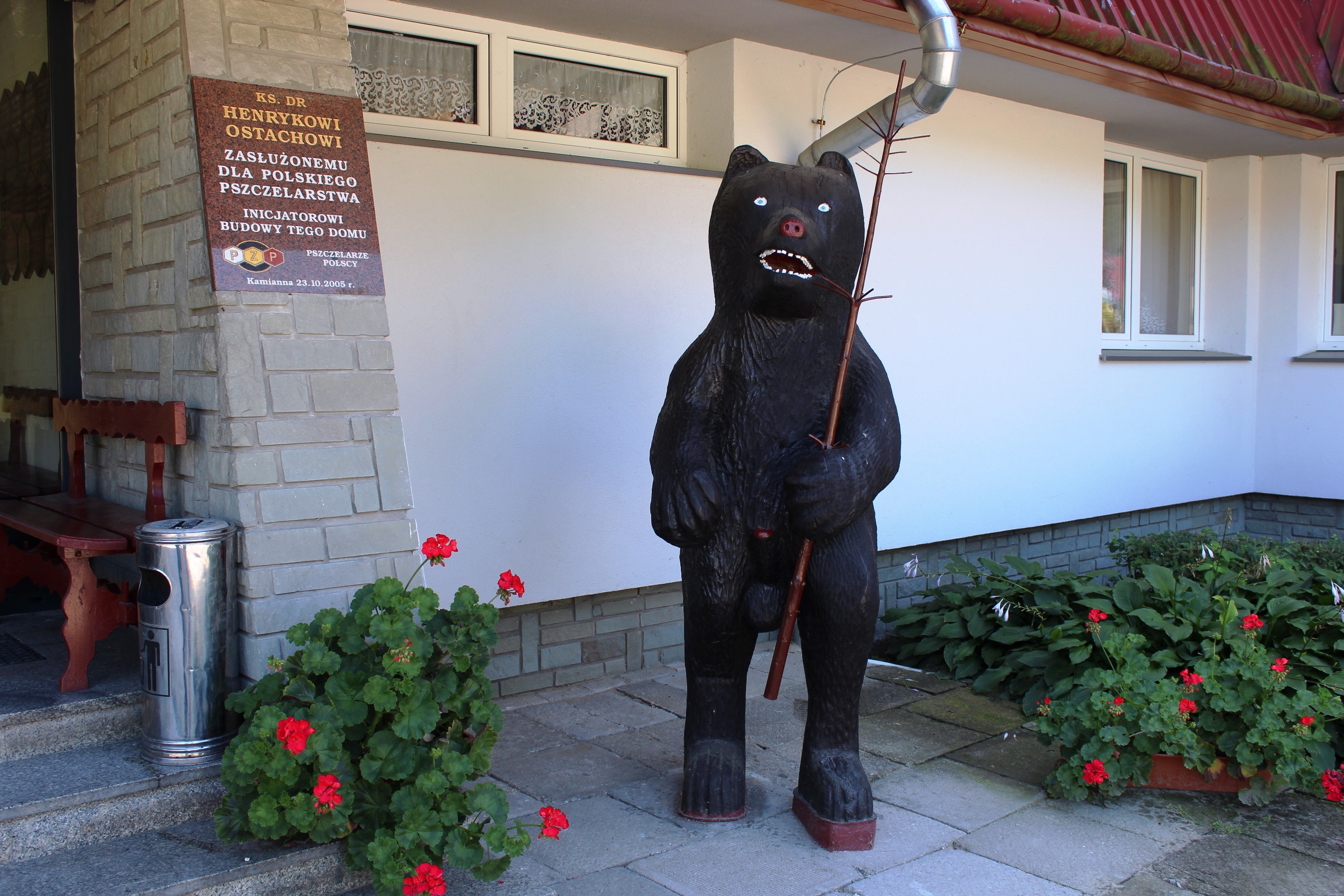 Kamianna